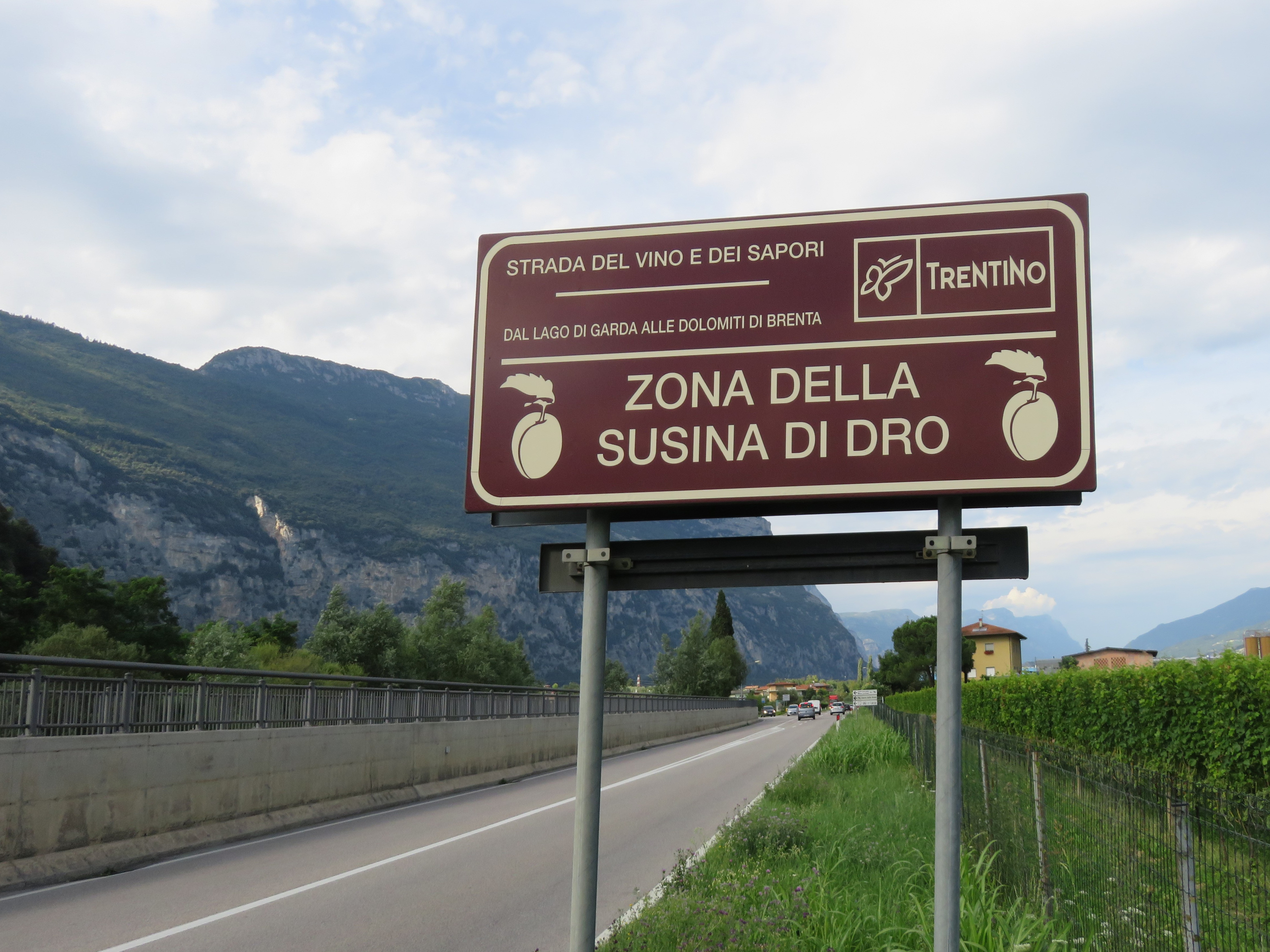 cartello in Trentino - la susina è un prodotto tipico locale della zona di Dro